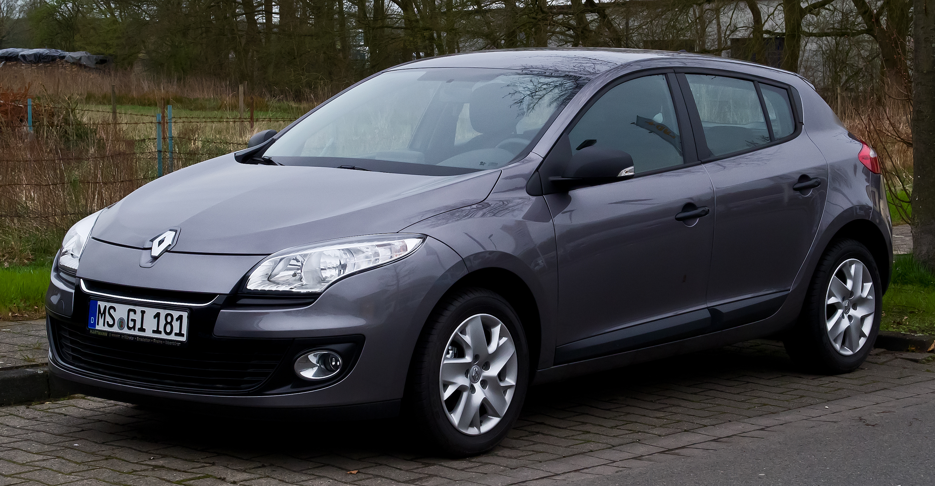 Renault Mégane (III, Facelift)